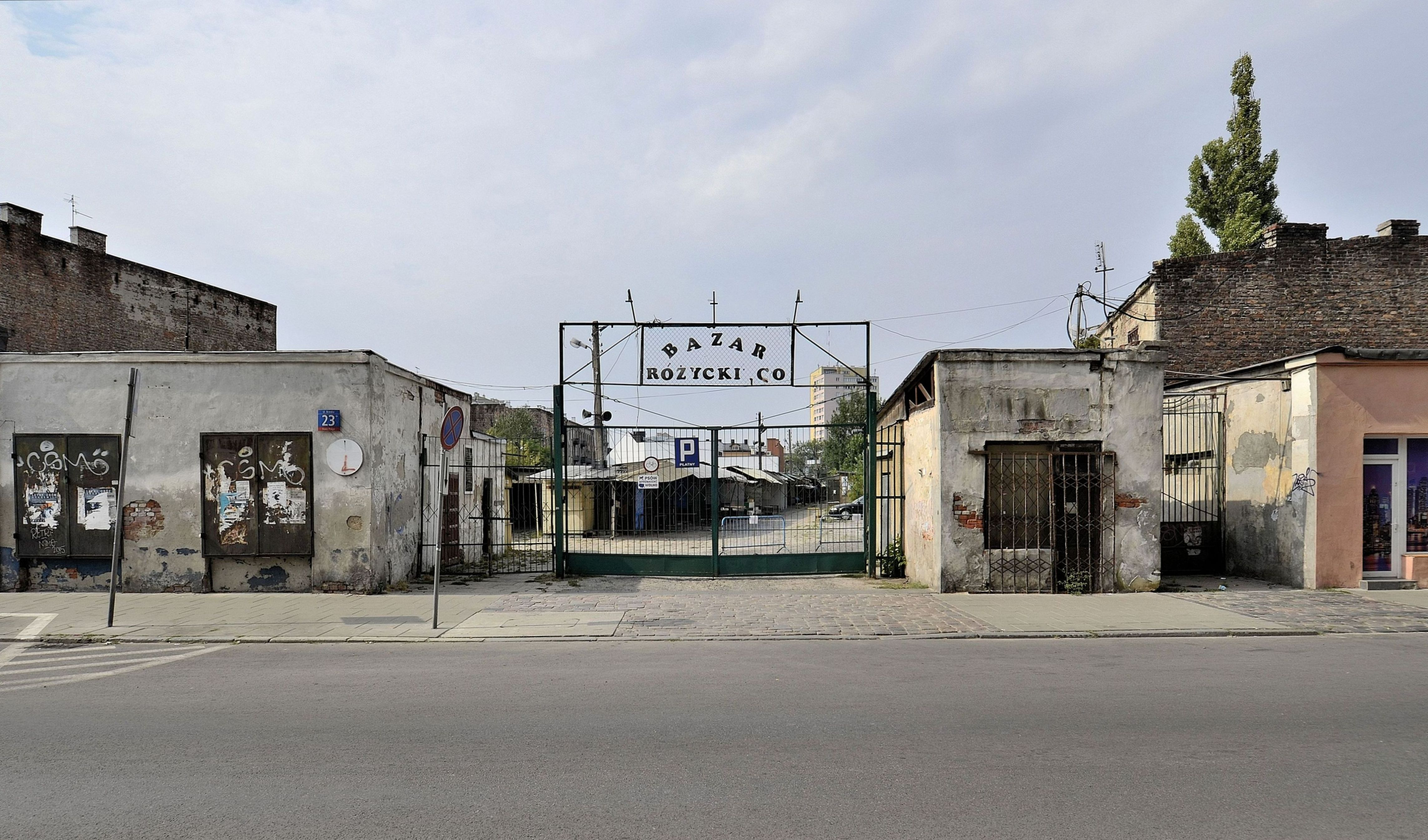 Bazar Różyckiego, wejście od strony ulicy Brzeskiej